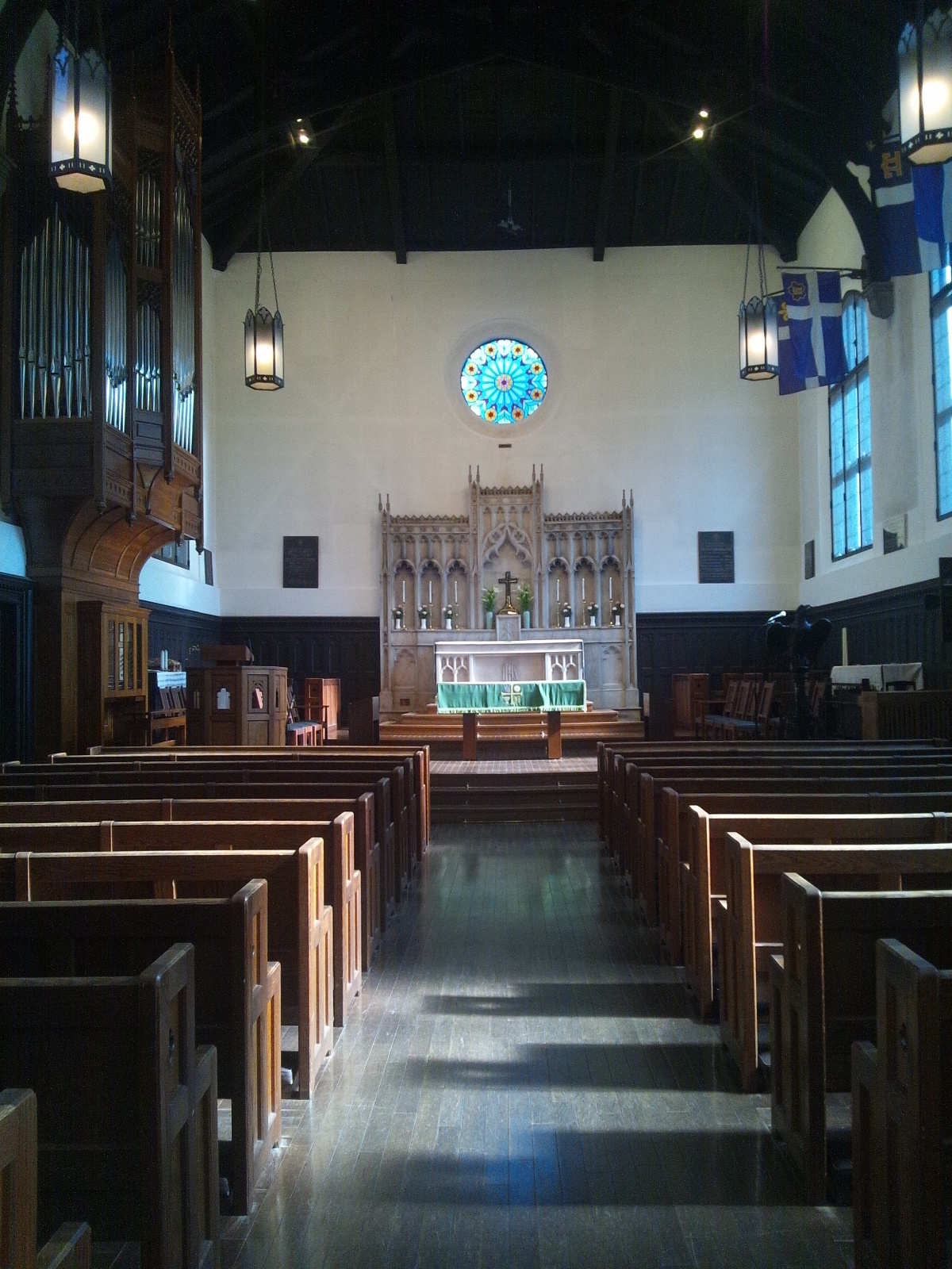 All Saints Chapel (諸聖徒礼拝堂) in Rikkyo (St. Paul's) University (立教大学)